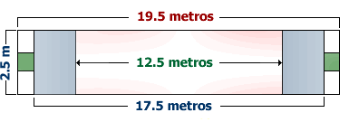 Es el plano de un campo de tejo, deporte originario de Colombia